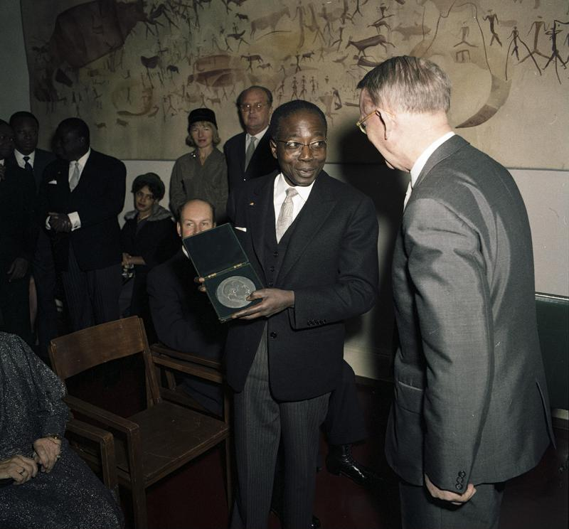 Staatspräsident von Senegal Senghor Besuch in Frankfurt am Main